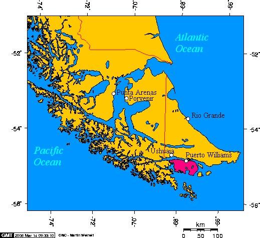 Island Navarino and Terra del Fuego